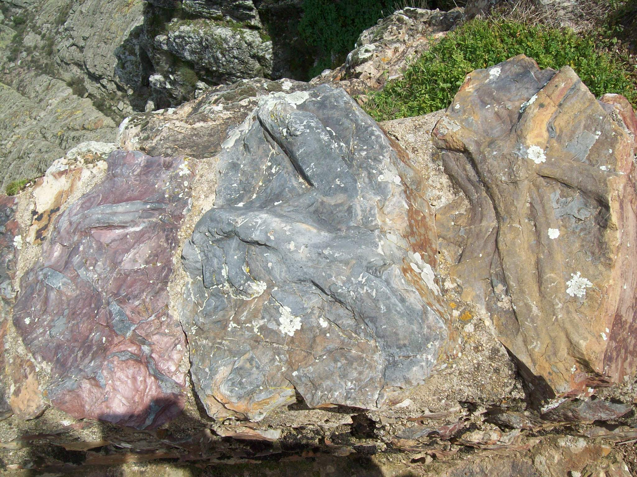 Um dos muitos fósseis nesta localidade